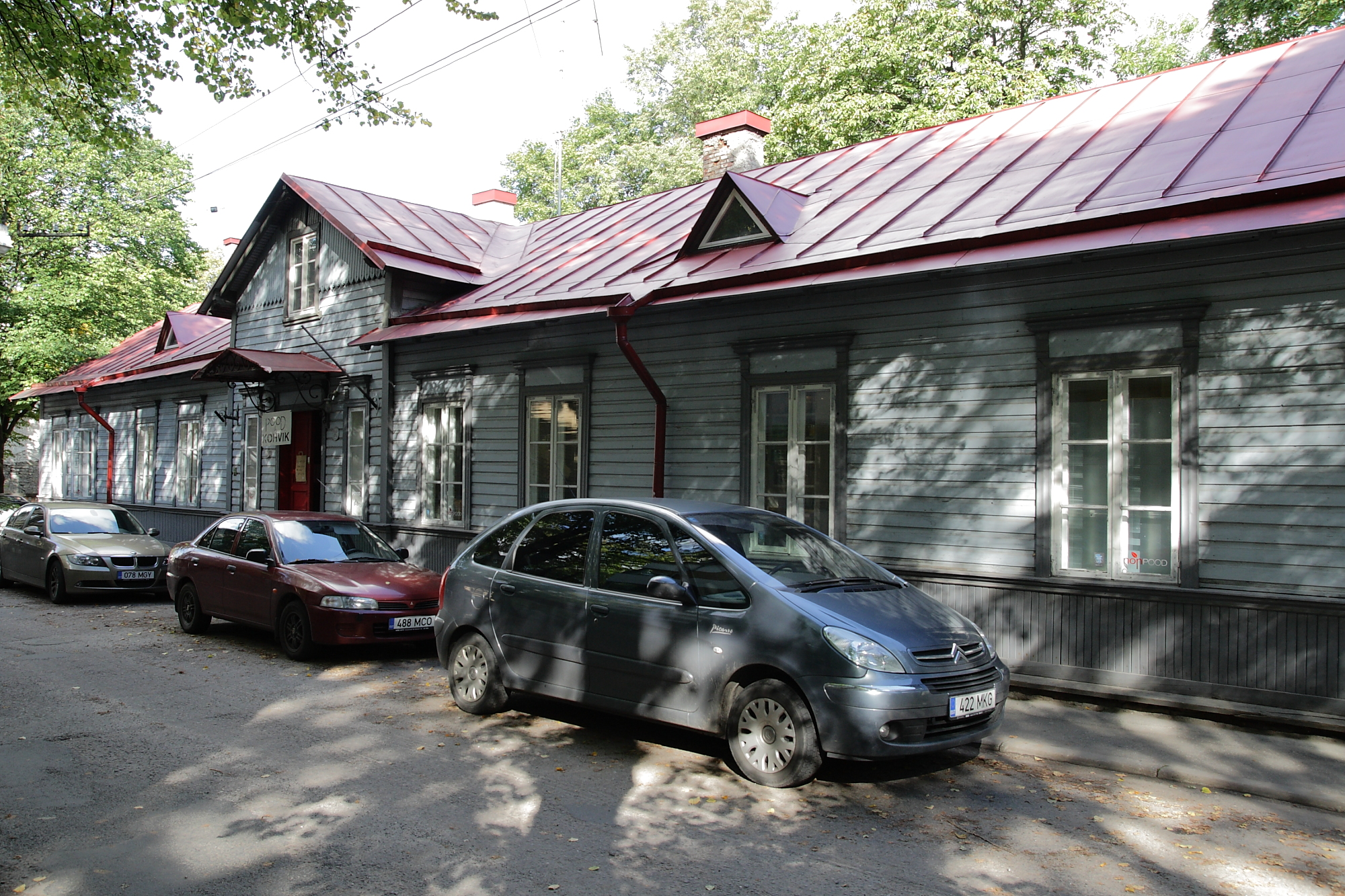 Tallinn, puitelamu, Johann Köleri 1